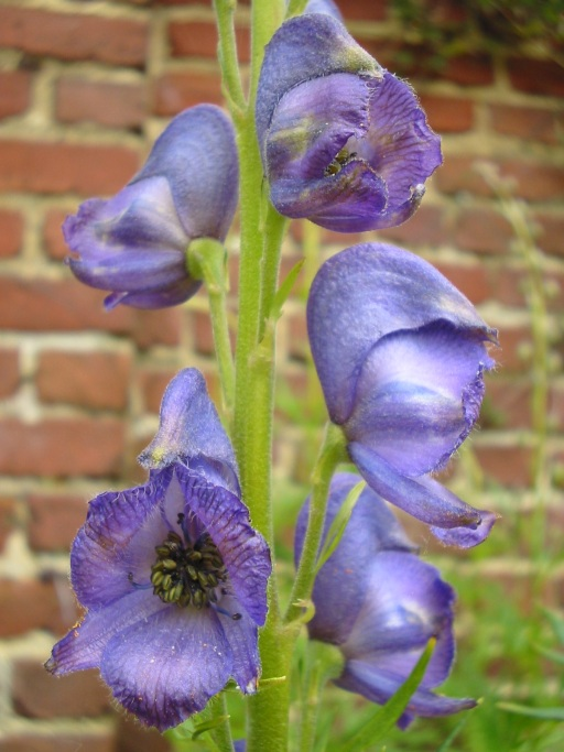 Aconit napel, , Dieppe